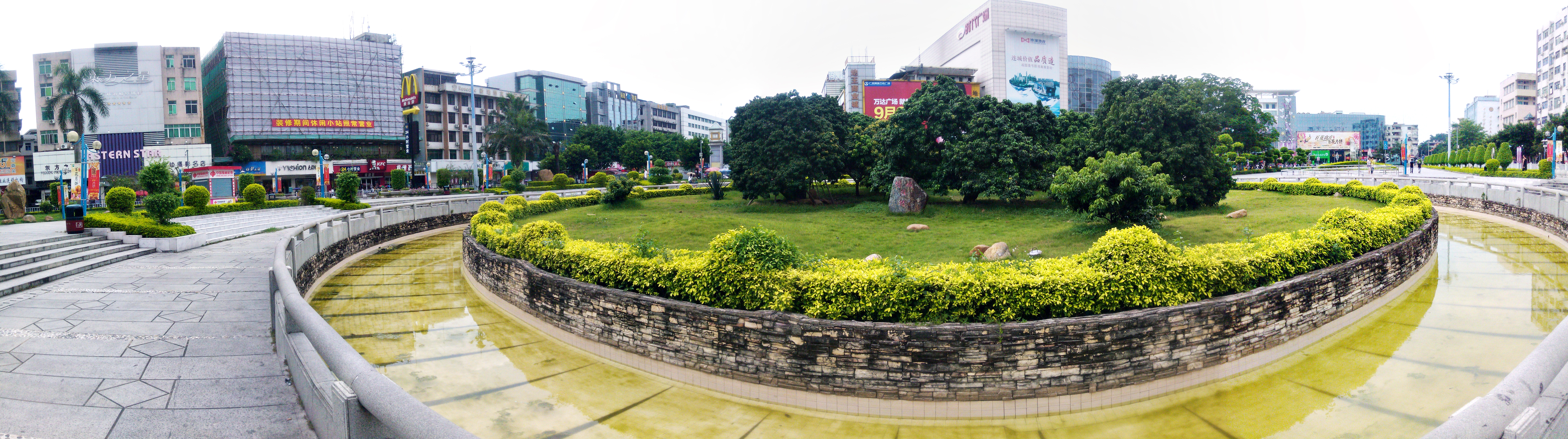 中文（中国大陆）: 挂绿荔枝 采用全景摄影